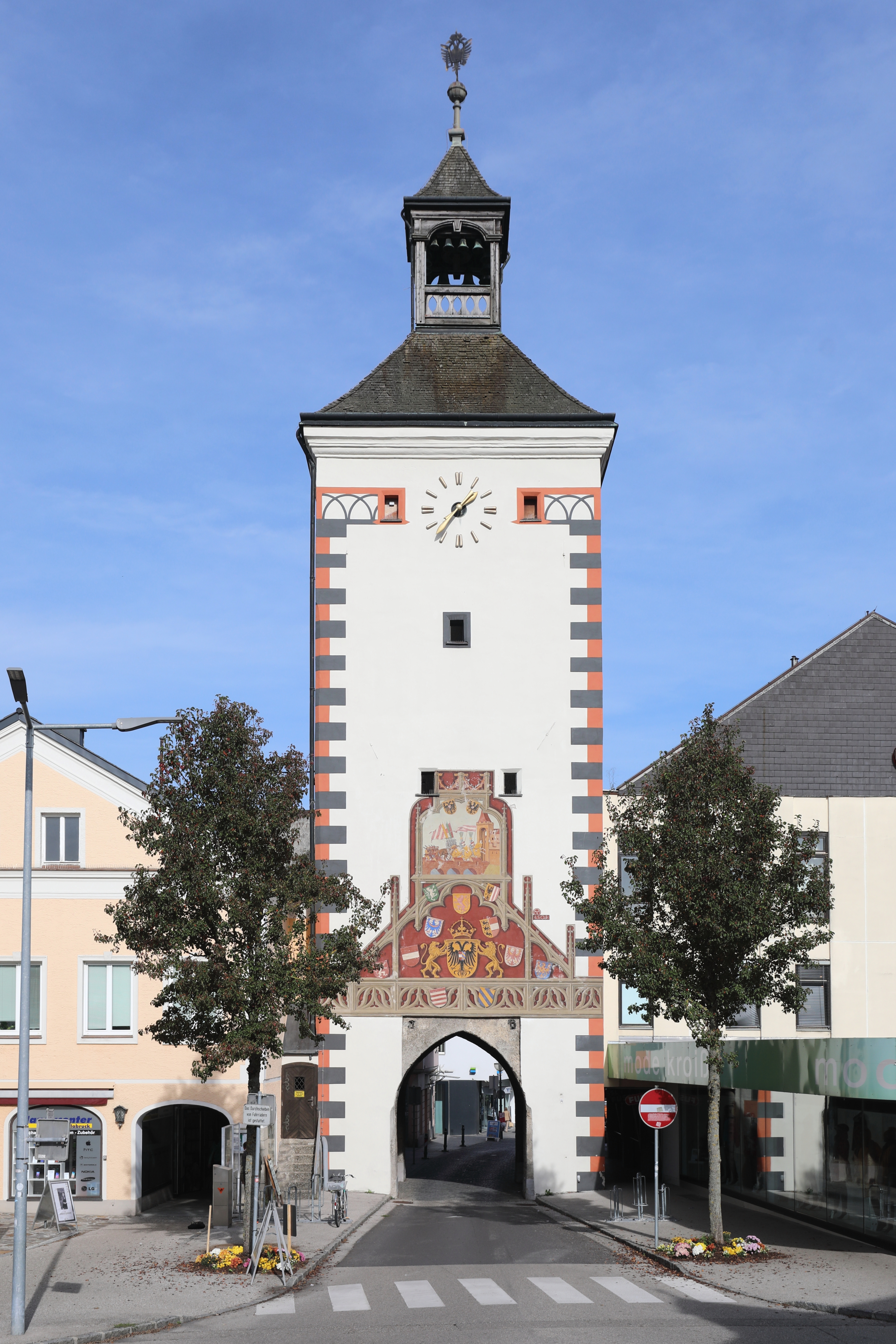 Südsüdwestansicht des oberen Stadtturmes der oberösterreichischen Stadt Vöcklabruck.Der obere Stadtturm entstand wie auch der untere Stadtturm zu Beginn des 14. Jahrhunderts. Der Turm hat eine gemauerte Höhe von fast 21 Meter und südwestseitig eine 1503 entstandenen Fassadenmalerei. Dessen Hauptmotiv zeigt die schon im ältesten bekannten Vöcklabrucker Stadtsiegel dargestellte Szene der beiden in die Stadt reitenden Ritter. Im dreieckigen Feld unterhalb sind die acht Wappen der österreichischen Erbländer dargestellt, sowie der von zwei Löwen gehaltene doppelköpfige Reichsadler und darüber das Stammwappen der Habsburger.